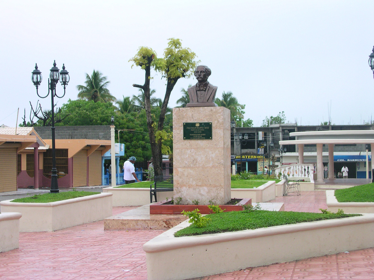 Parque Municipal de Nizao